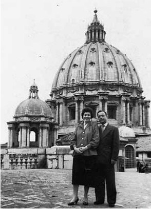 עליזה וגמליאל ברומא